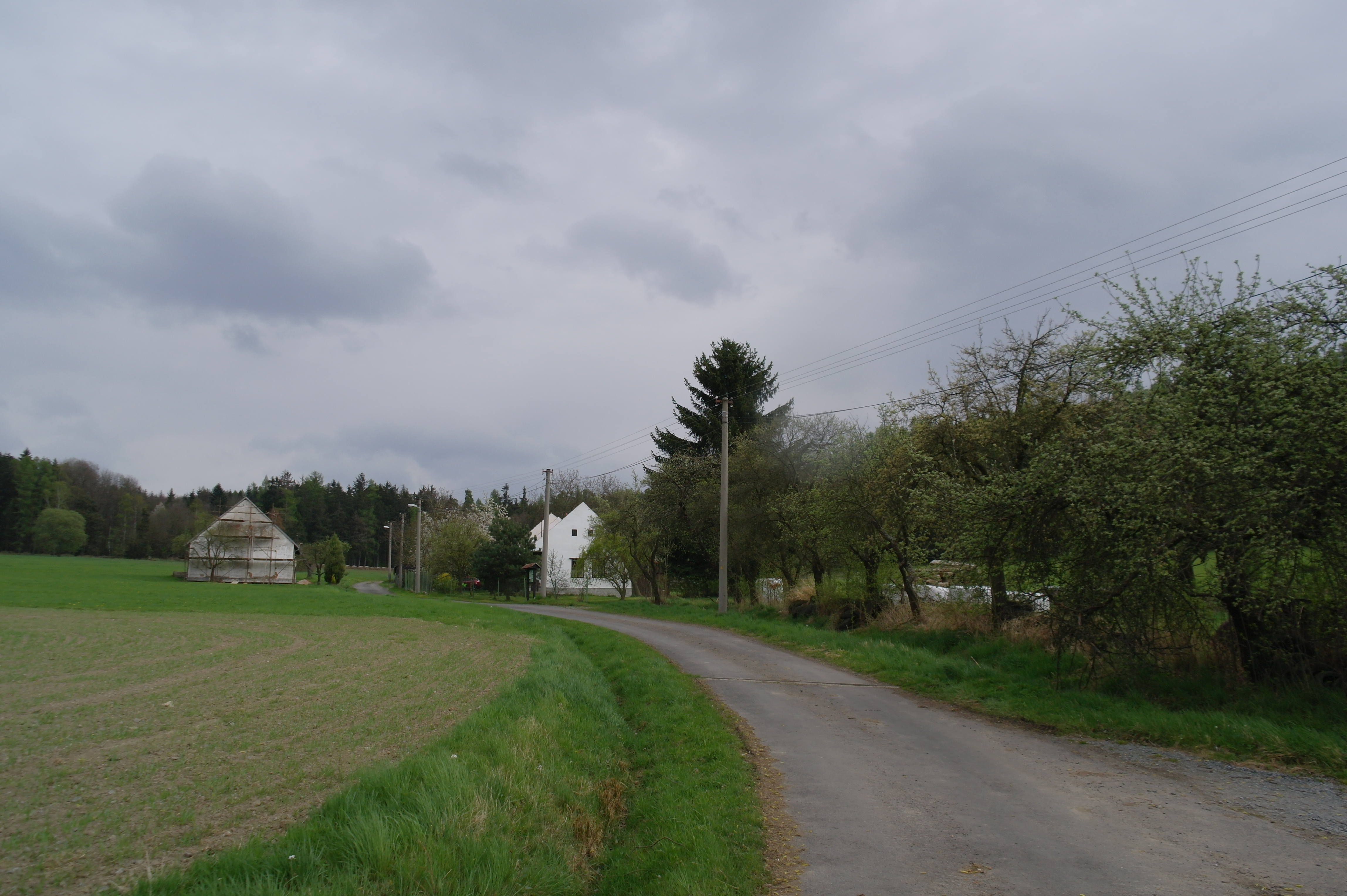 Těšnice